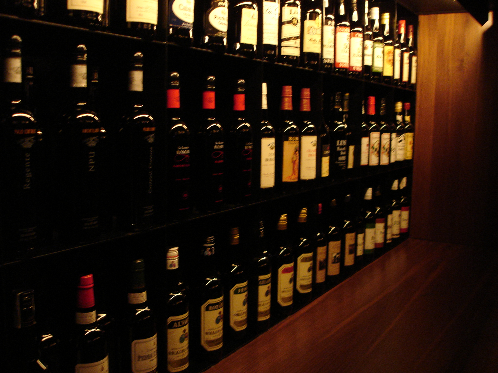 Botella de vino de Jerez en el Museo de Jerez de Jerez de la Frontera. Andalusia (Sapin)